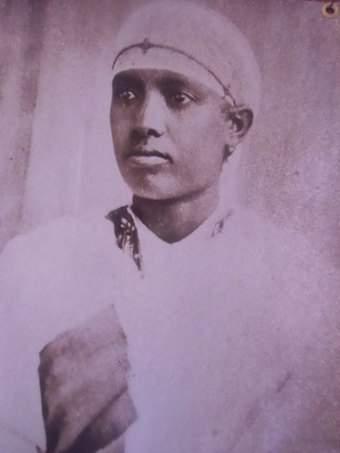 Mariam (ca 1860 - ?) compagna etiopica di Arthur Rimbaud. Foto pubblicata da Ottorino Rosa (1853-1930) in "L'Impero del Leone di Giuda", Brescia, Lenghi, 1913